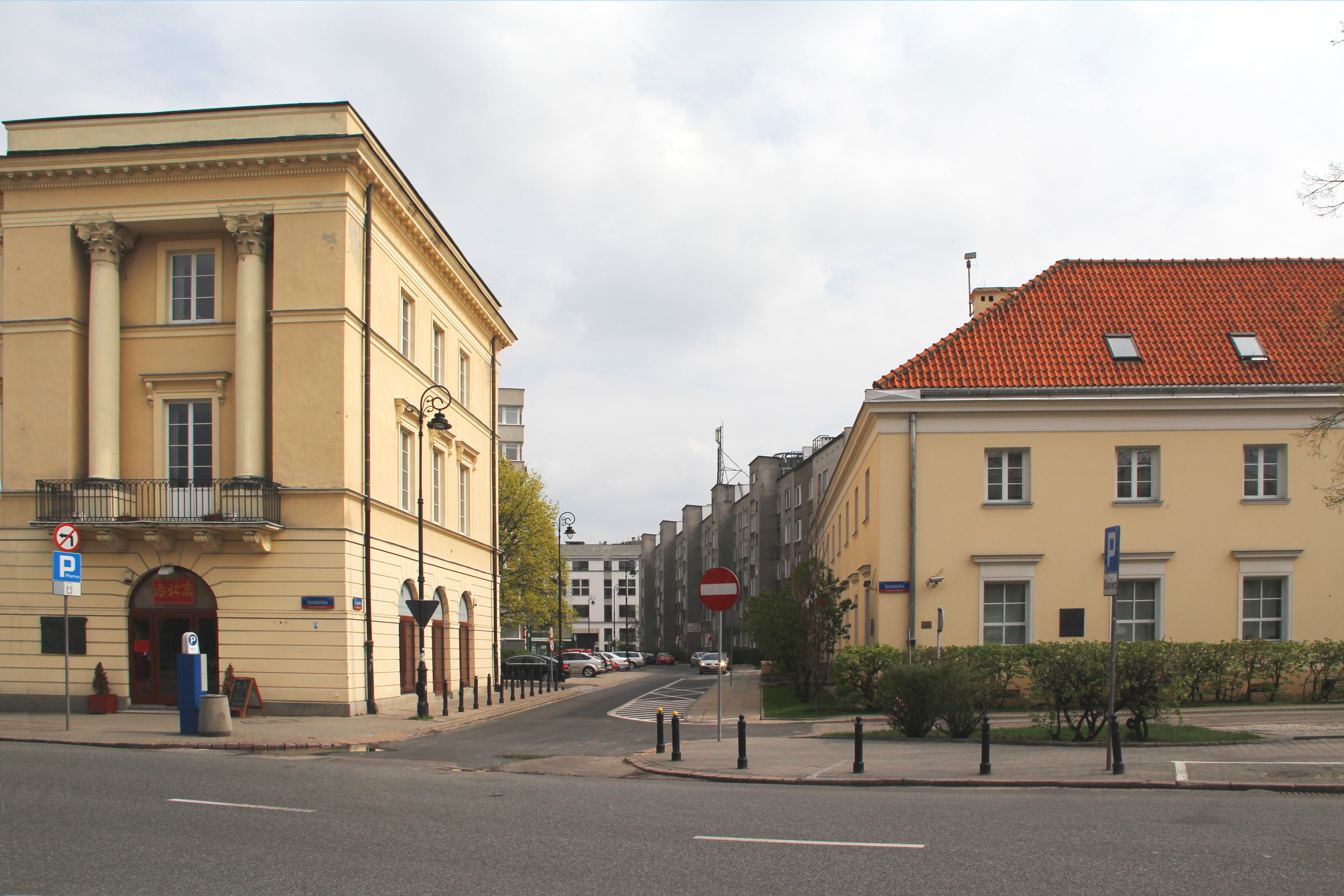 Canaletto street warsaw